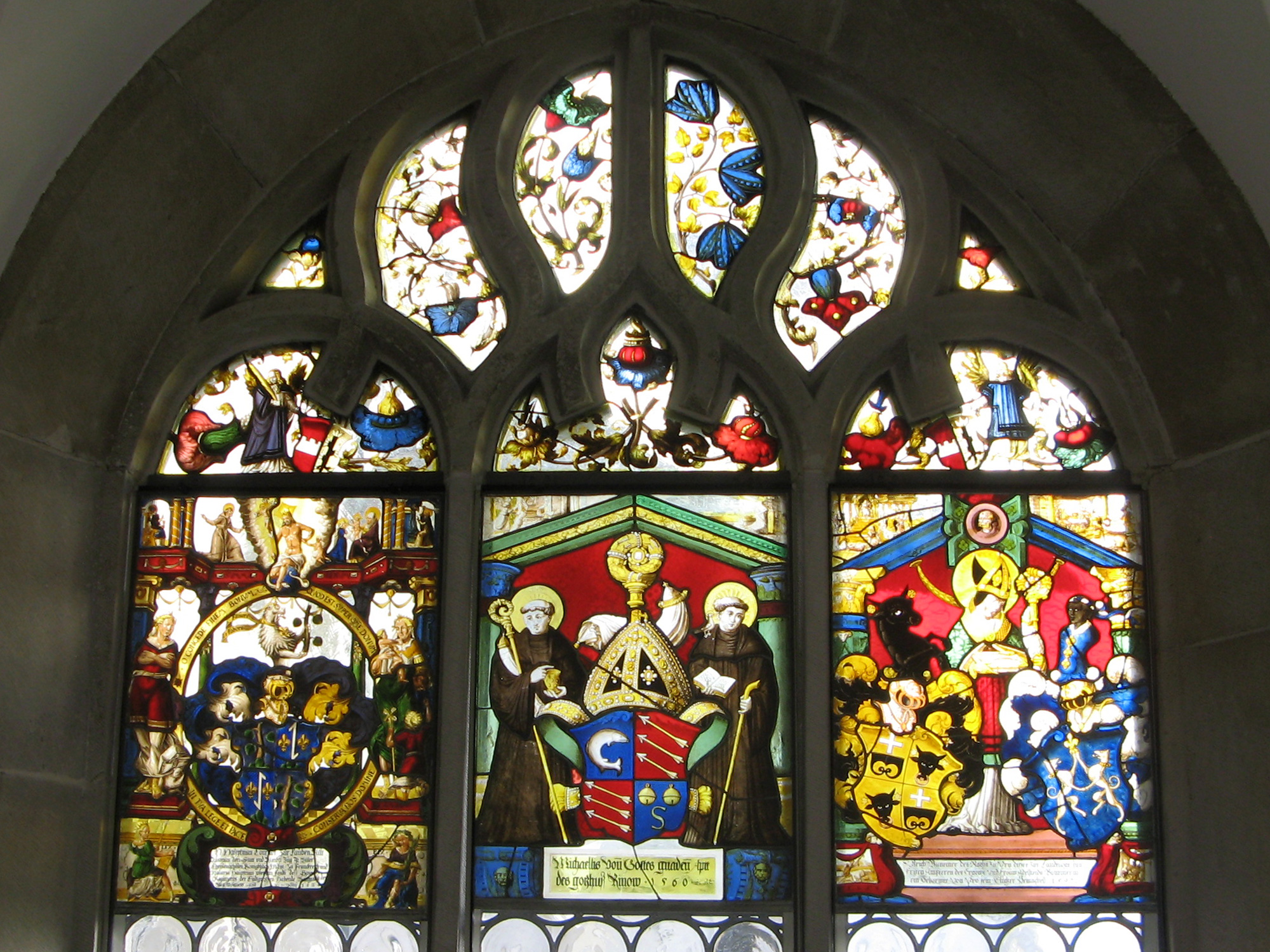 Kreuzgang des Klosters Muri. Fenster S2, gestiftet von Konrad Zurlauben (1624), Kloster Rheinau (1560) und Ulrich Püntener (1597).